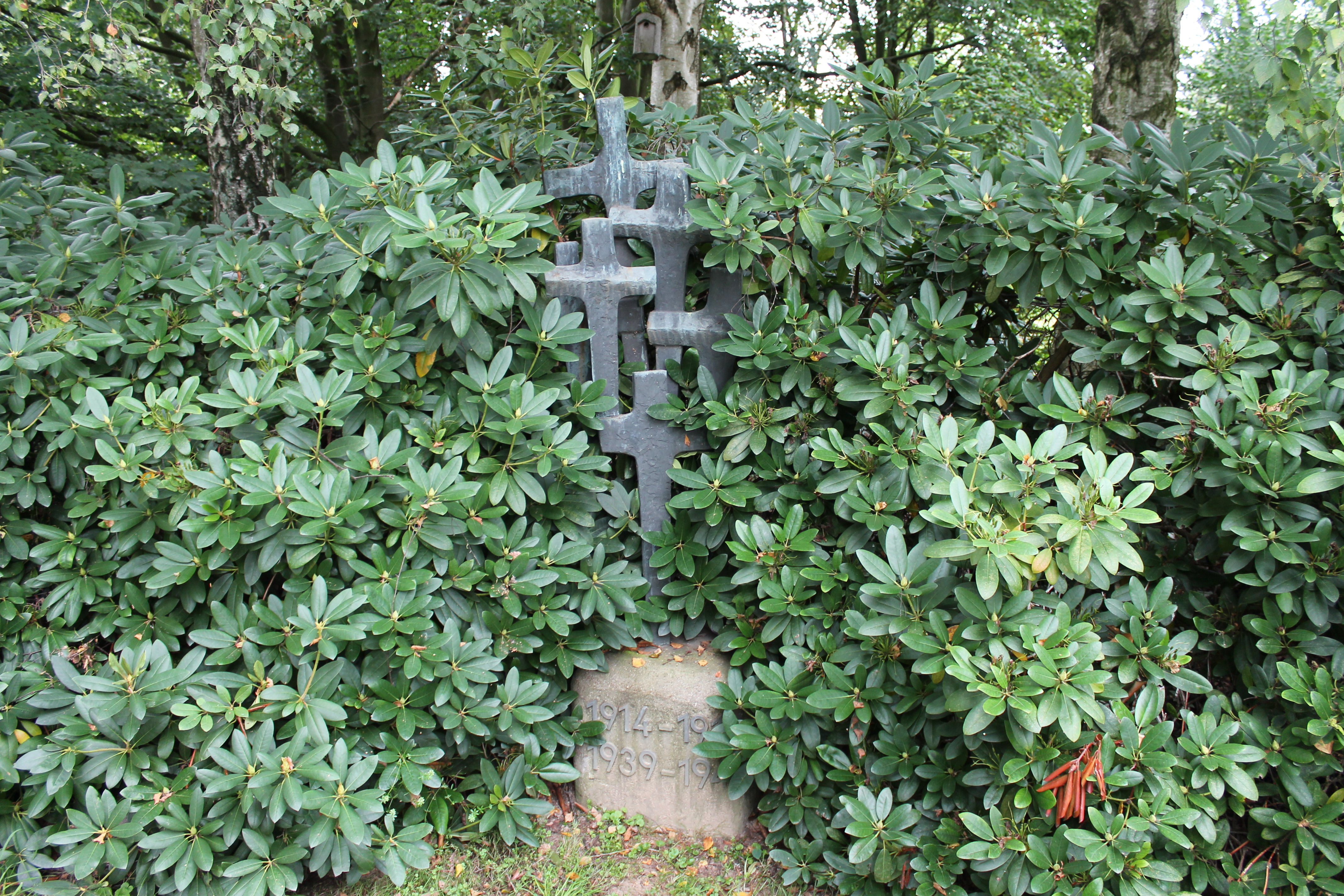 Herford, Baudenkmal 389. Kriegerdenkmal, Friedhof Diebrock.